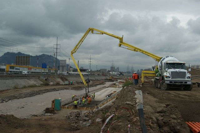 25-09-2013 Parque Renato Poblete